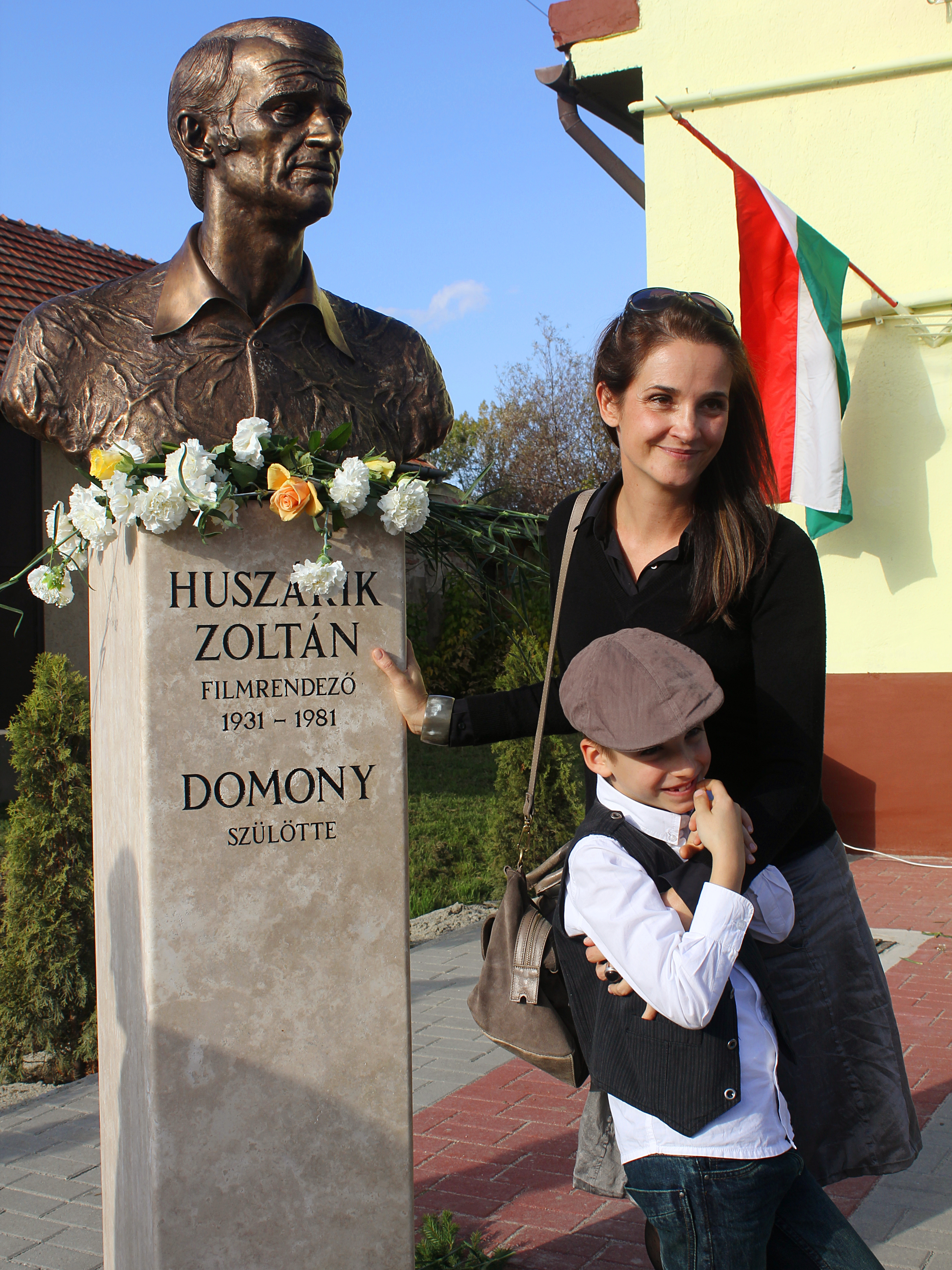 Pest megye, Domony, Fő út 89., művelődési ház Esemény: Huszárik Zoltán szobor avatása (szobrász: Monori Sebestyén)